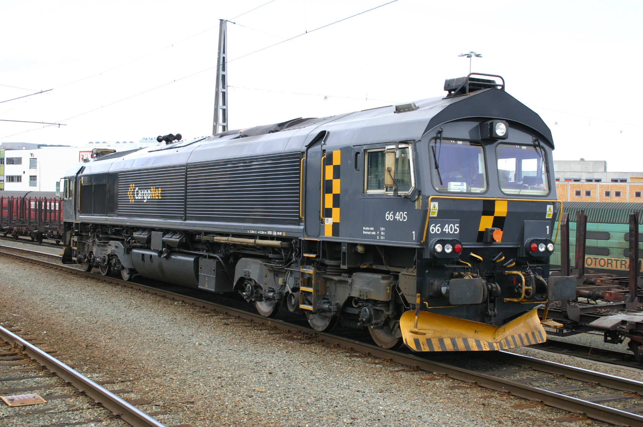 Diesellokomotive Di 66.405 Trondheim 06.08.05